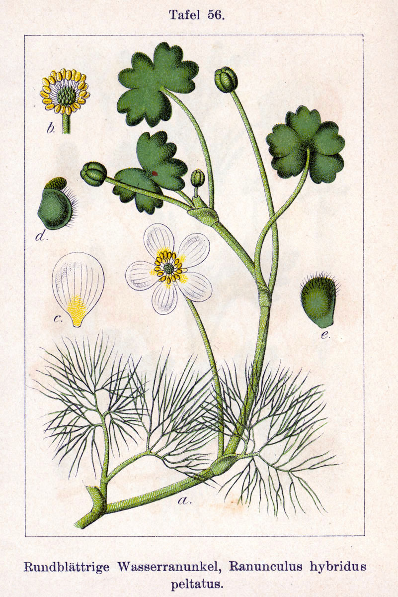 Ranunculus peltatus Schrank s. l. Original Description Rundblättrige Wasserranunkel, Ranunculus hybridus peltatus